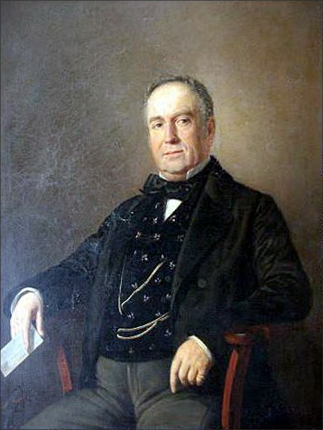 José María Fernández y López Empresario, bodeguero.